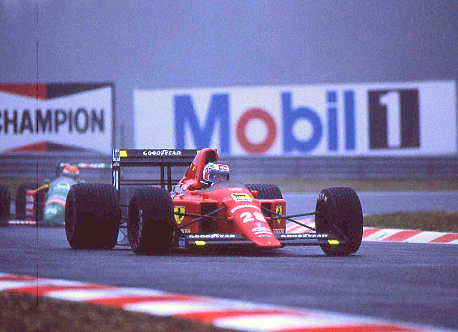 Gerhard Berger - Ferrari - ( scan diapo )